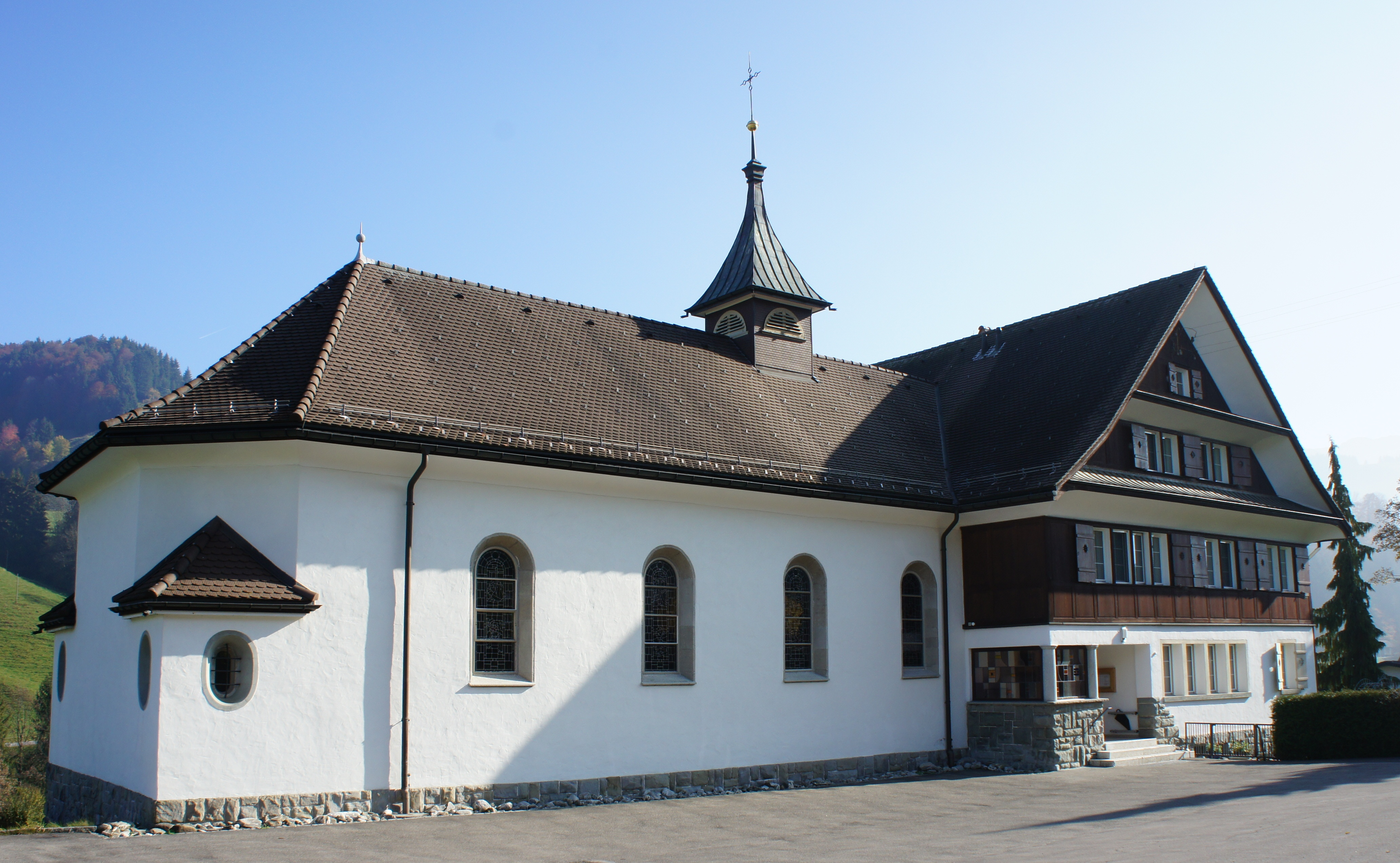 Blick aus Norden auf die kath. Kirche von Urnäsch im Weiler Zürchersmühle. Anstelle eines Glockenturmes befindet sich ein kleiner Dachreiter im südwestlichen Teil des Firstes. Am südwestlichen Ende der Kirche ist ein Wohnhaus in Kreuzgiebelform angebaut. Hier befindet sich auch der Eingang zur Kirche.